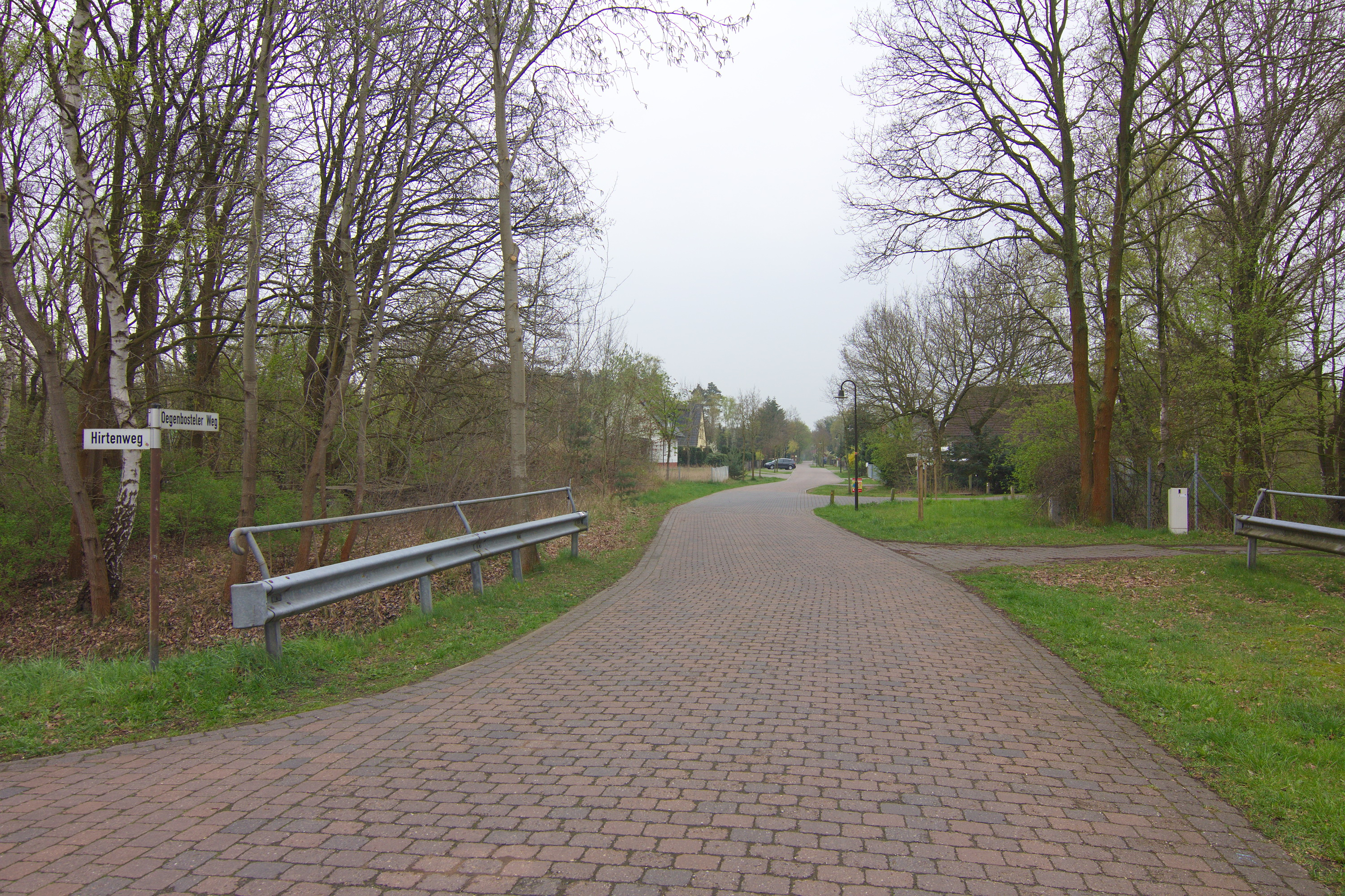 Ortsblick in Lindwedel, Niedersachsen, Deutschland